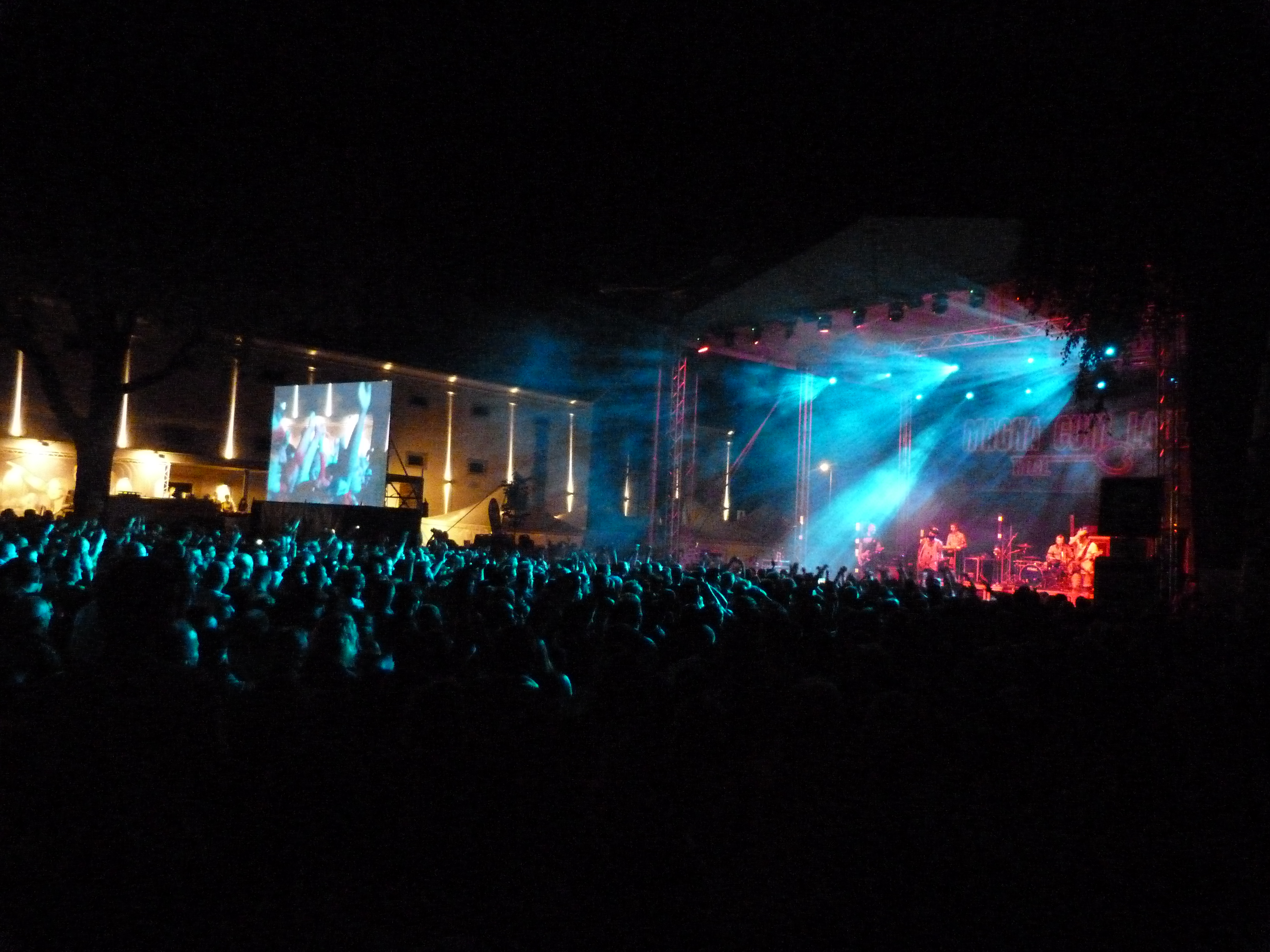 A felvétel 2013. Augusztus 18 –án, vasárnap készült Mosonmagyaróváron. A város főutcáján felállított színpadon a Magna Cum Laude zenekar. Mosonmagyaróváron a Szent István Király út mosoni részén rendezték meg a 4. Mosonmagyaróvári Nyári Fesztivált. ©© Published under Creative Commons in the Metapolisz DVD line. All of the photos and vids in the Metapolisz DVD line are under Creative Commons and can be used even for commercial – for profit – purposes. Recommended Citation Derzsi Elekes Andor: Metapolisz DVD line